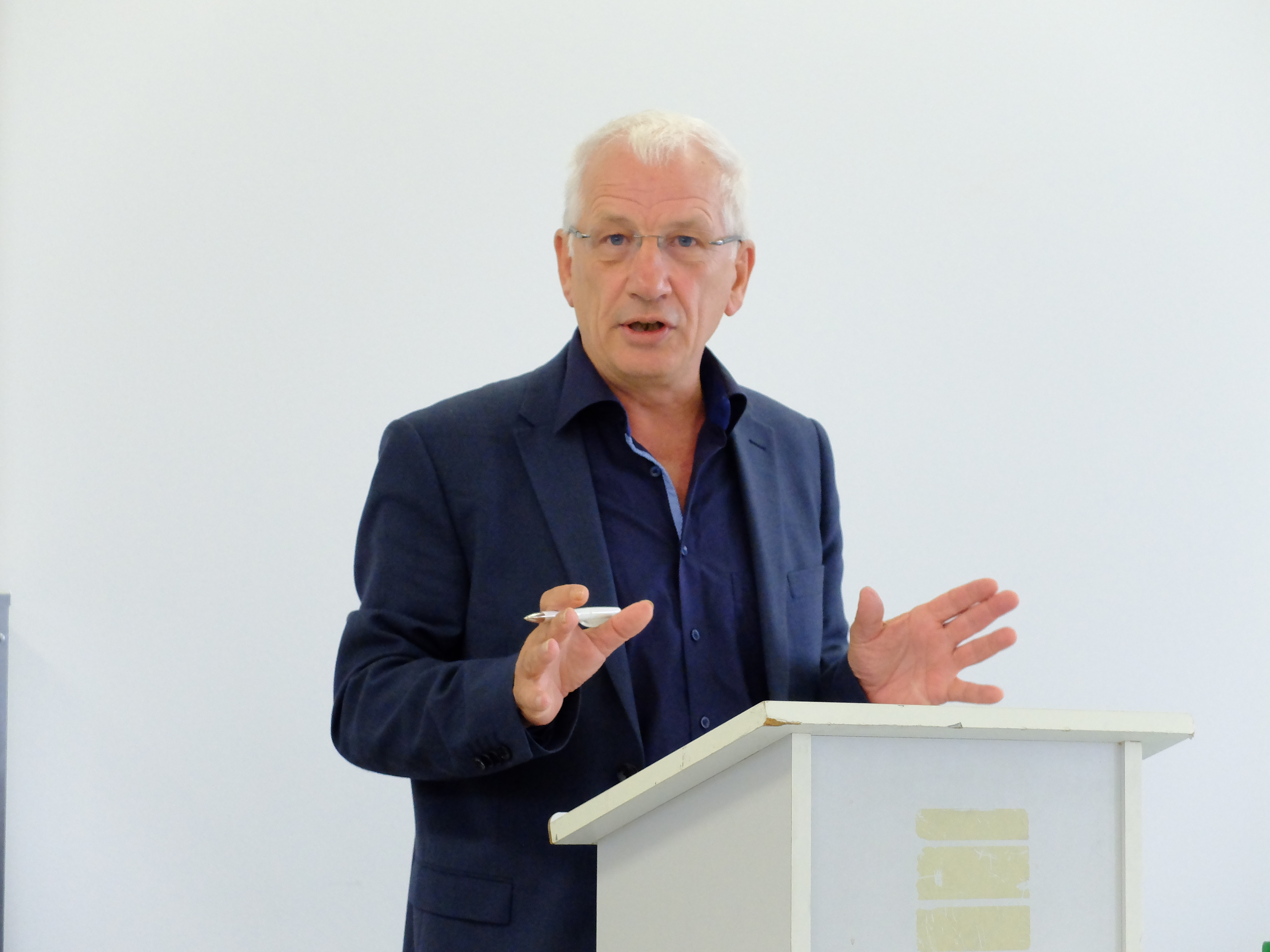 Der Soziologe Albert Scherr auf dem 38. Kongress der Deutschen Gesellschaft für Soziologie, September 2016.